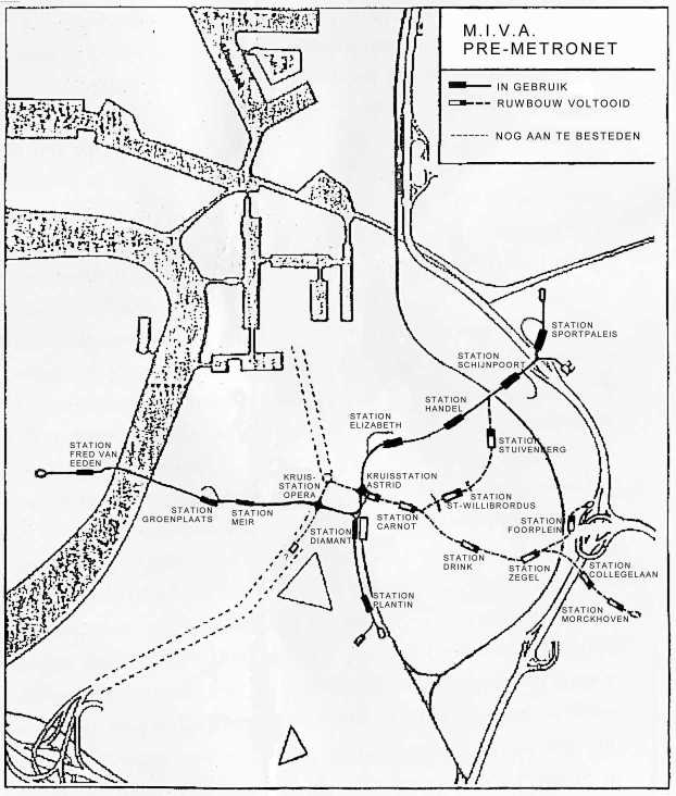 Oude publicatie van het Antwerpse pre-metronet, inclusief het "slapende" gedeelte. Vanaf 18 april 2015 is een deel van het slapende gedeelte in gebruik genomen. zie Reuzenpijp